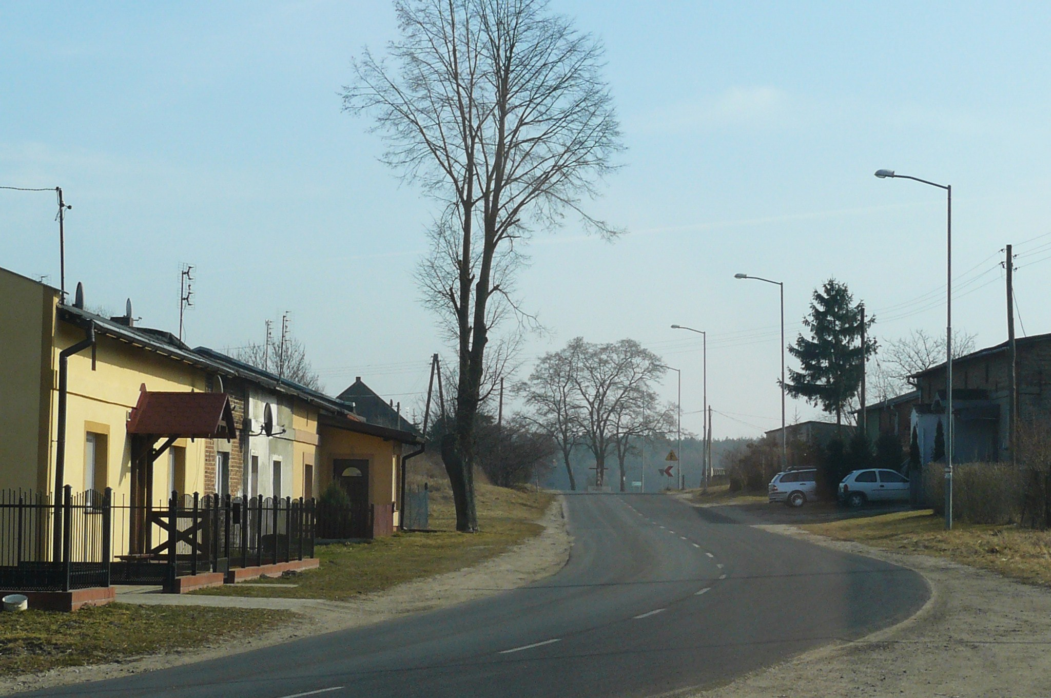 Gołuń. Gm. Pobiedziska.